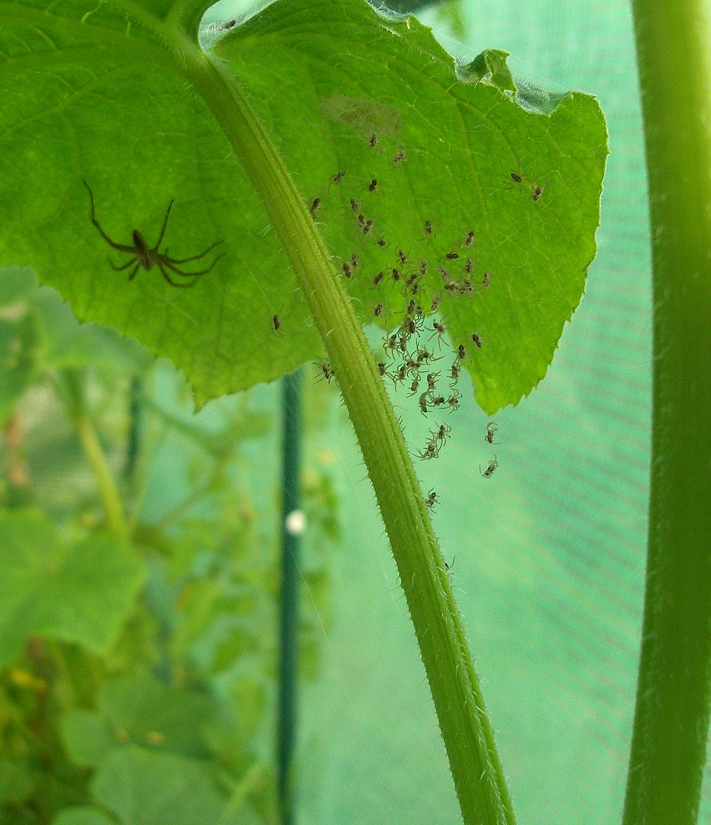 Auf dem Bild sieht man hinten links die große Spinne, vorne rechts die kleinen Spinnen die sehr klein und jung sind